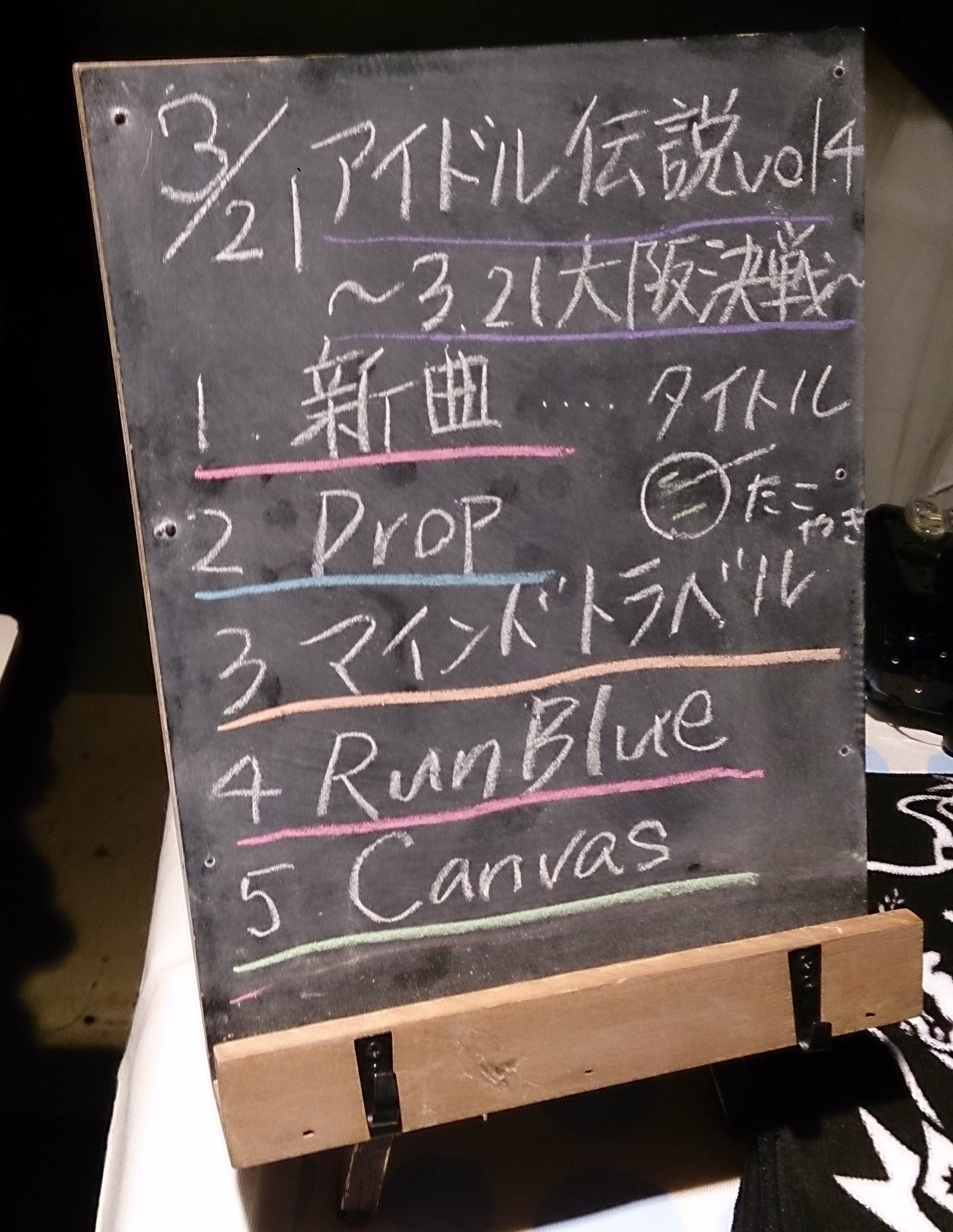 amiinaセトリボード(20150321(1))